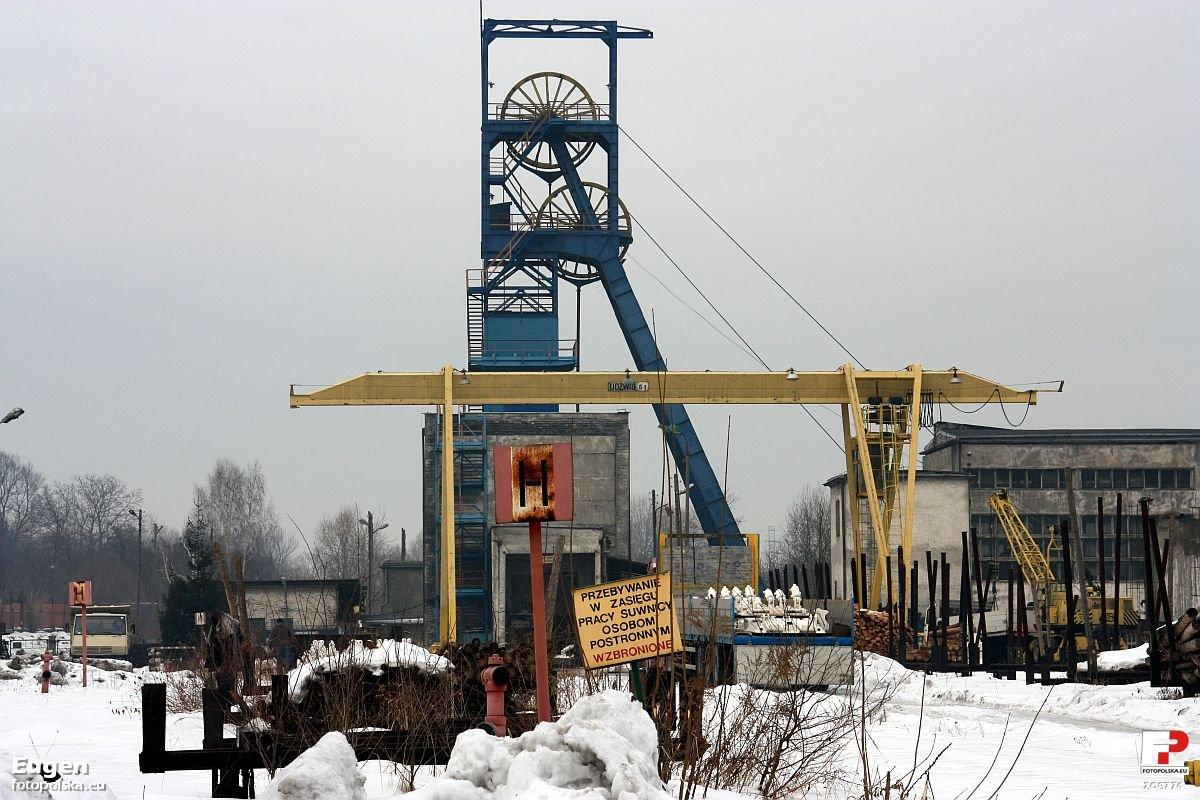 Szyb Witczak.